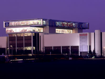 New Yorker Zentrale in Braunschweig (Germany)